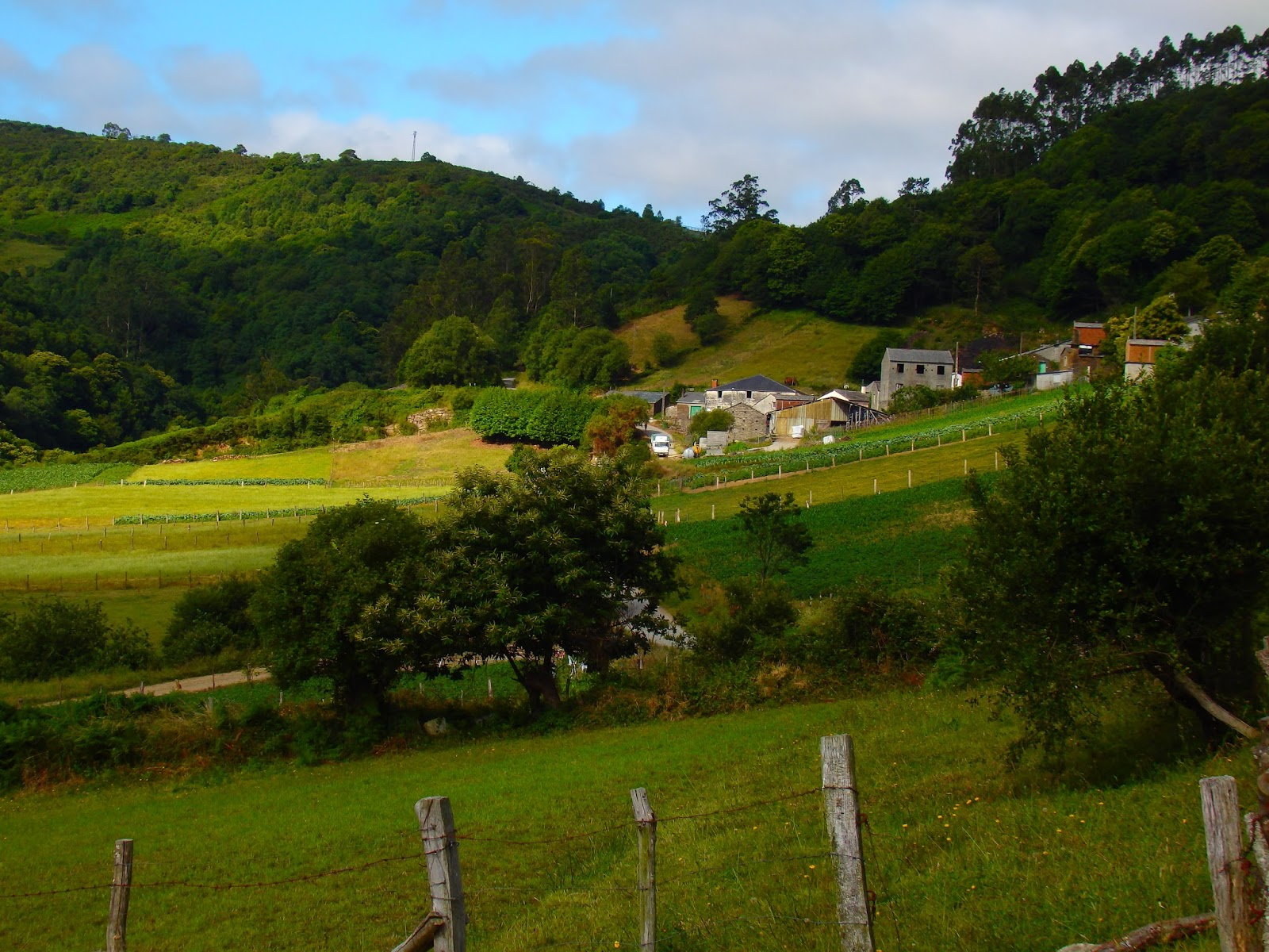 Vista de Lousada, Sasdónigas, Mondoñedo, España